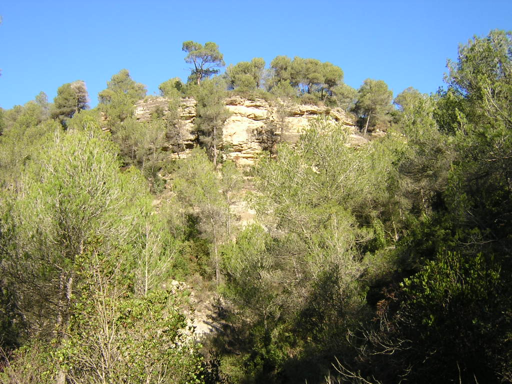 El Turó del Jep Dó des de migdia (Monistrol de Calders, Moianès)